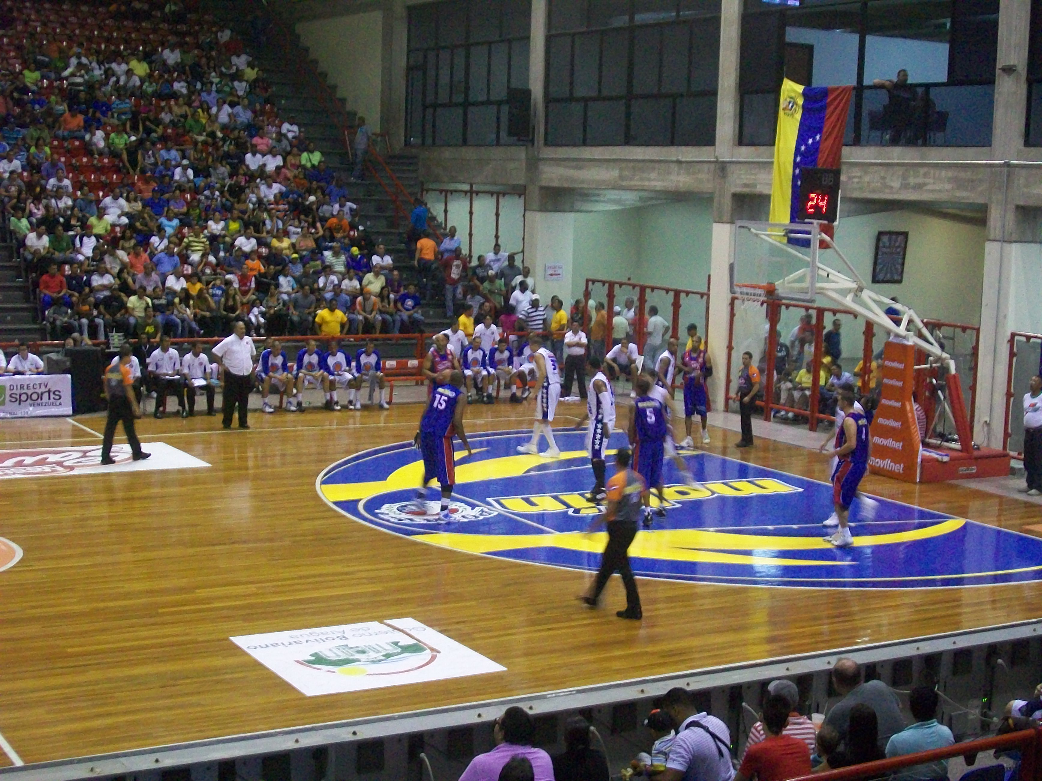 Juego en vivo de Trotamundos de Carabobo vs Toros de Aragua de la Liga Profesional de Basketball Venezolano